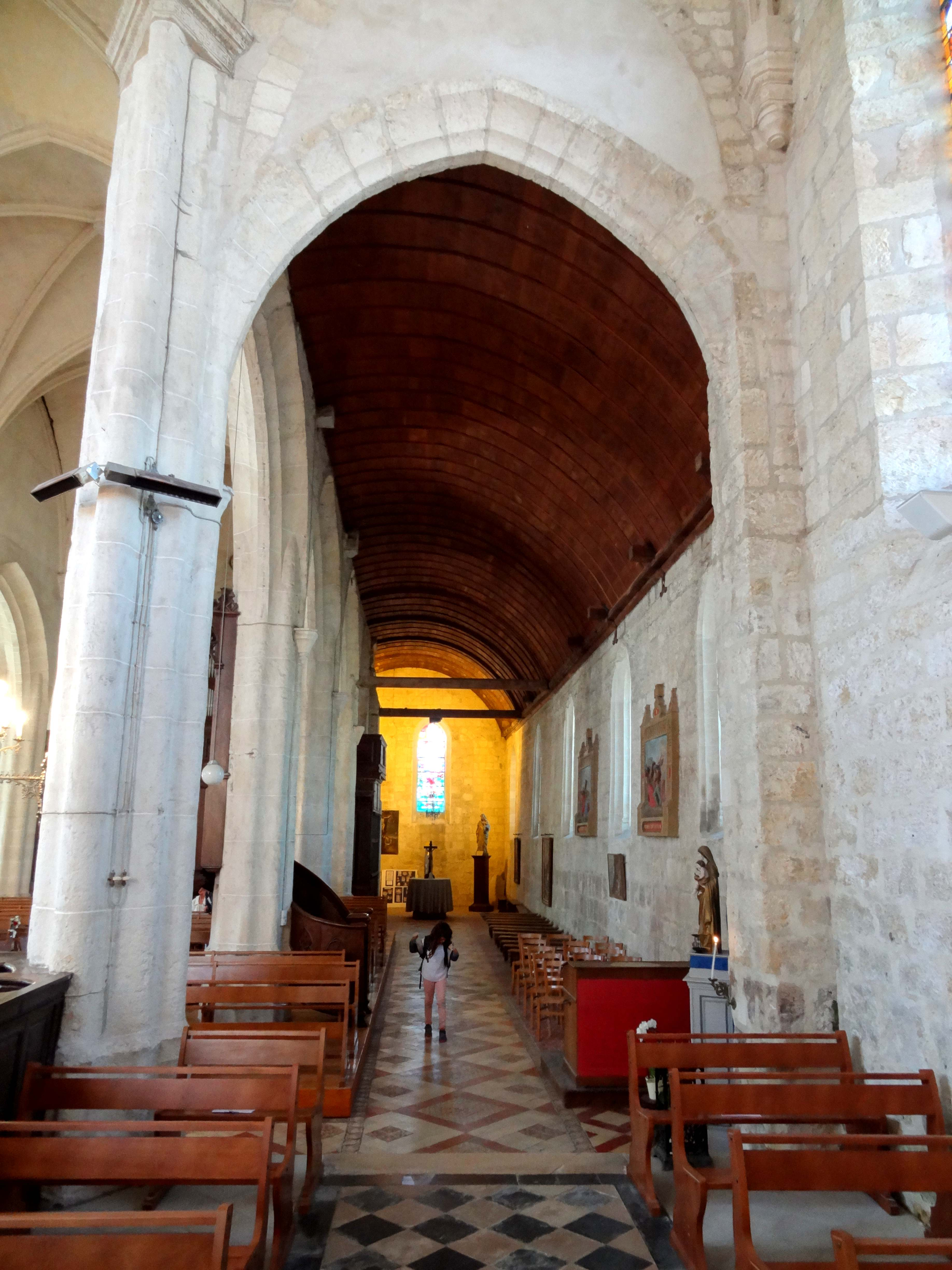 Intérieur de l'église - voir titre.